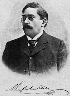 Vsevolod Solovyov